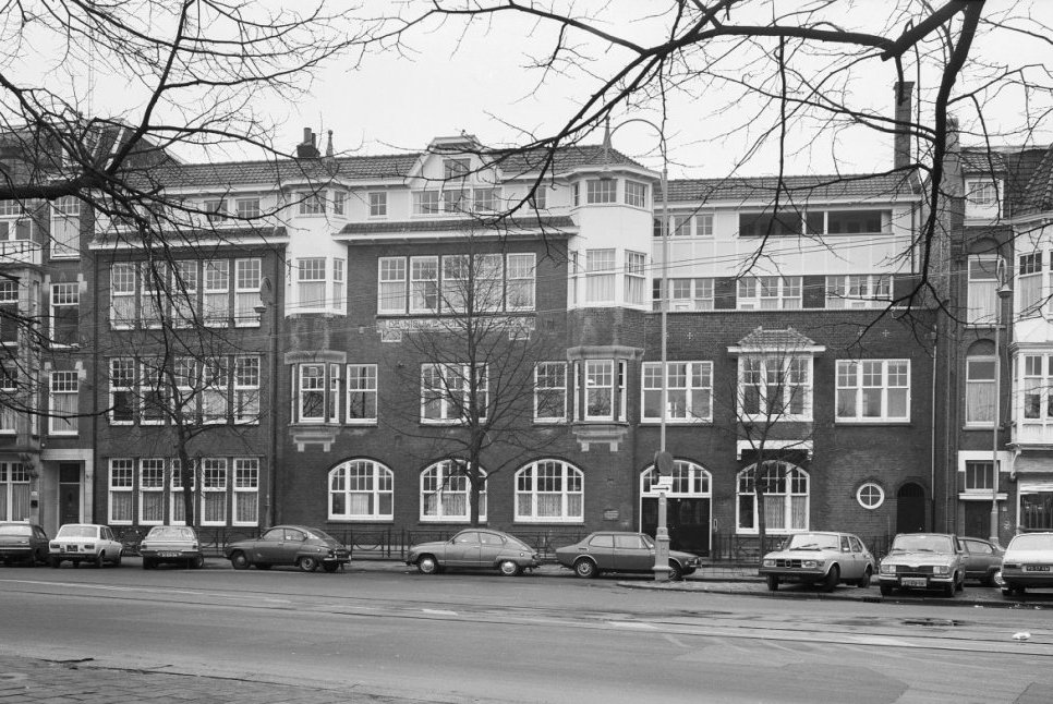 voorgevels